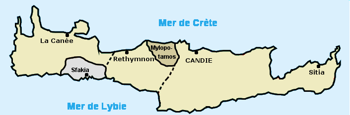 Division administrative de la Crète ottomane entre 1669 et 1867.